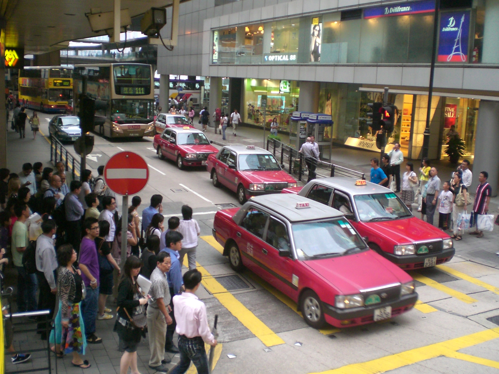 林士街, 香港的士站,德輔道中, 紅綠燈